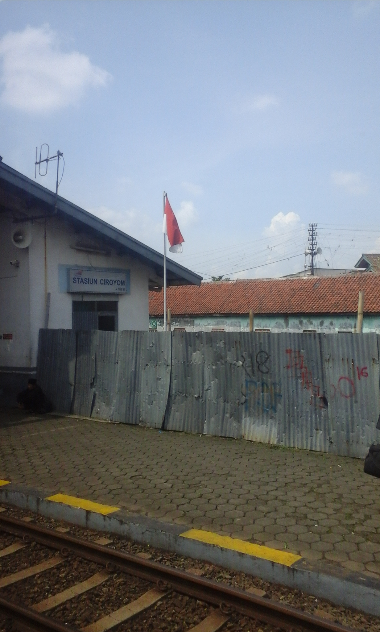 Stasiun Ciroyom sedang proses renovasi